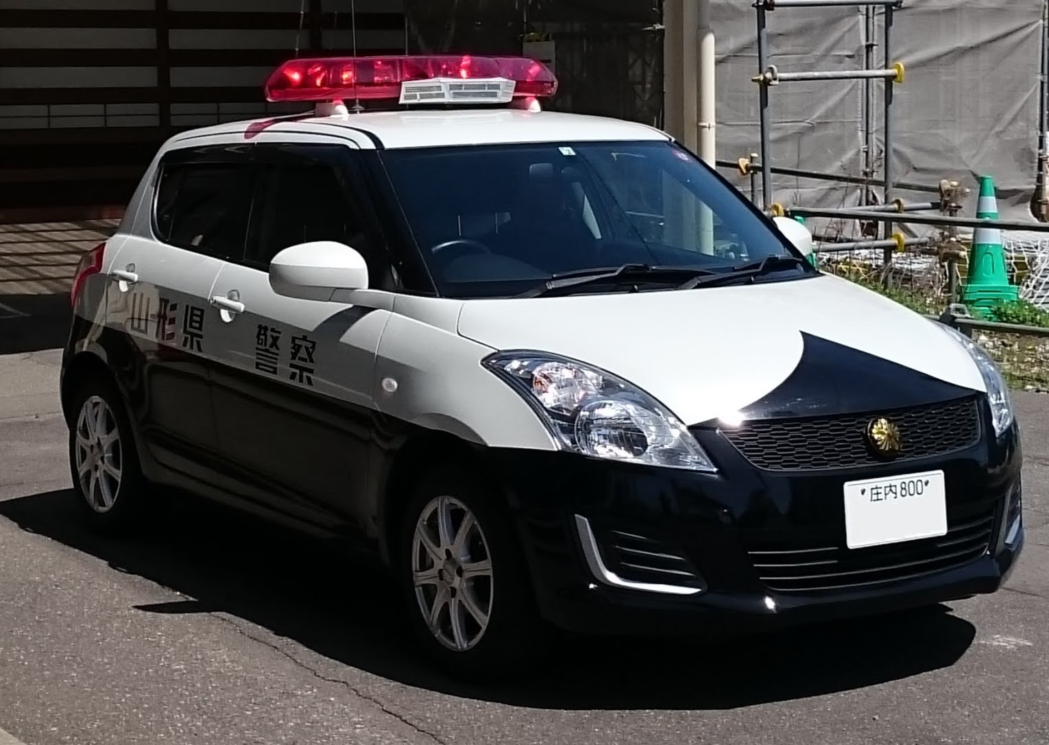 山形県警察の捜査車両（スズキ スイフト）、酒田駅前交番にて